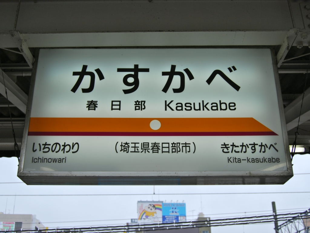 東武鉄道伊勢崎線春日部駅3番線駅名標（2008/10/24撮影）